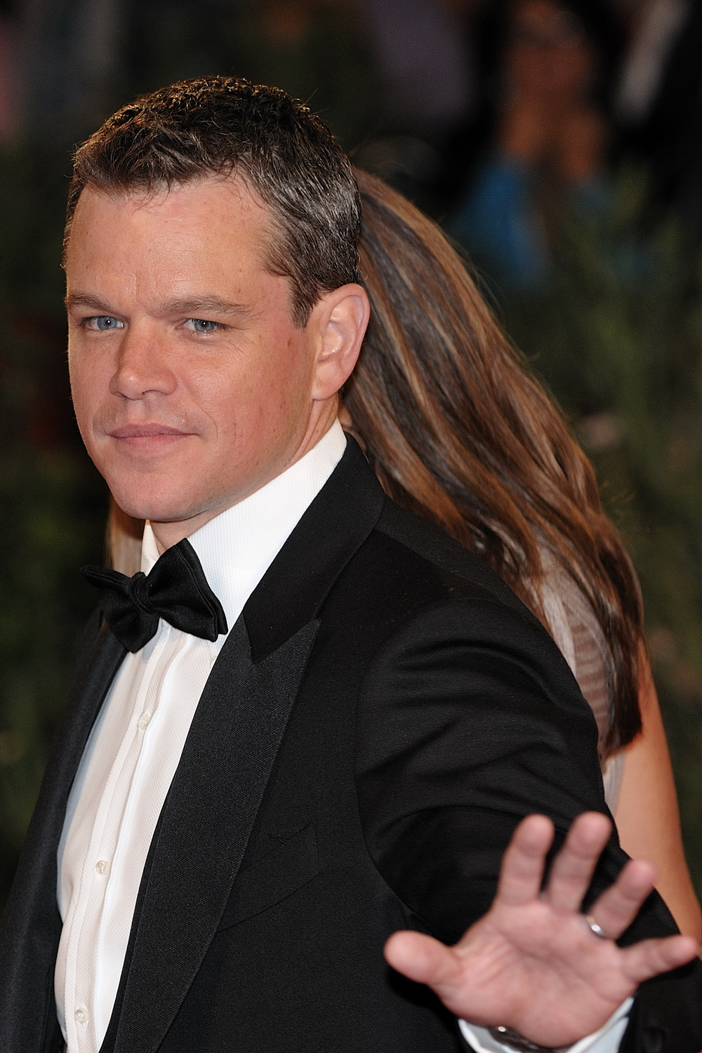 66ème Festival du Cinéma de Venise (Mostra), 6ème jour (07/09/2009) Tapis rouge avec Matt Damon (et sa femme) avec Steven Soderbergh pour le film : The Informant